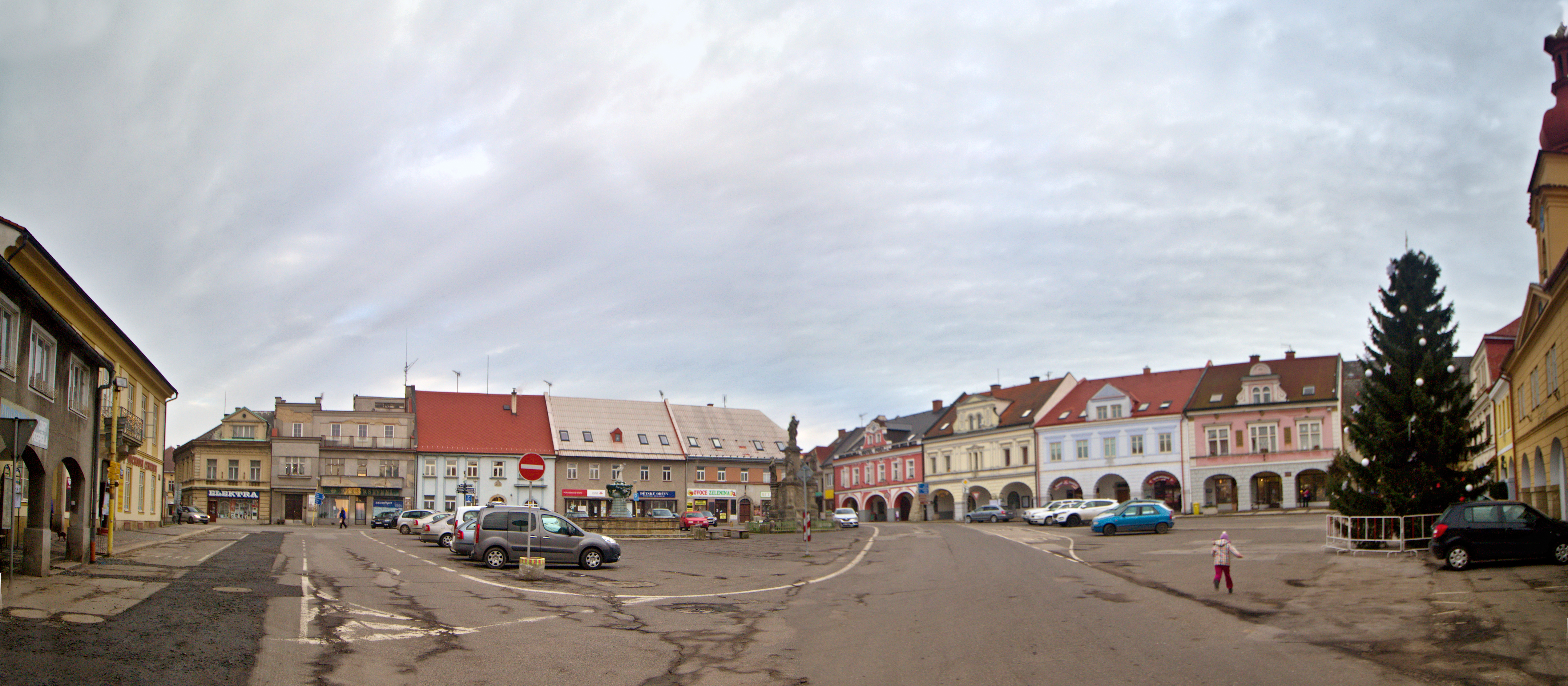 Sobotka